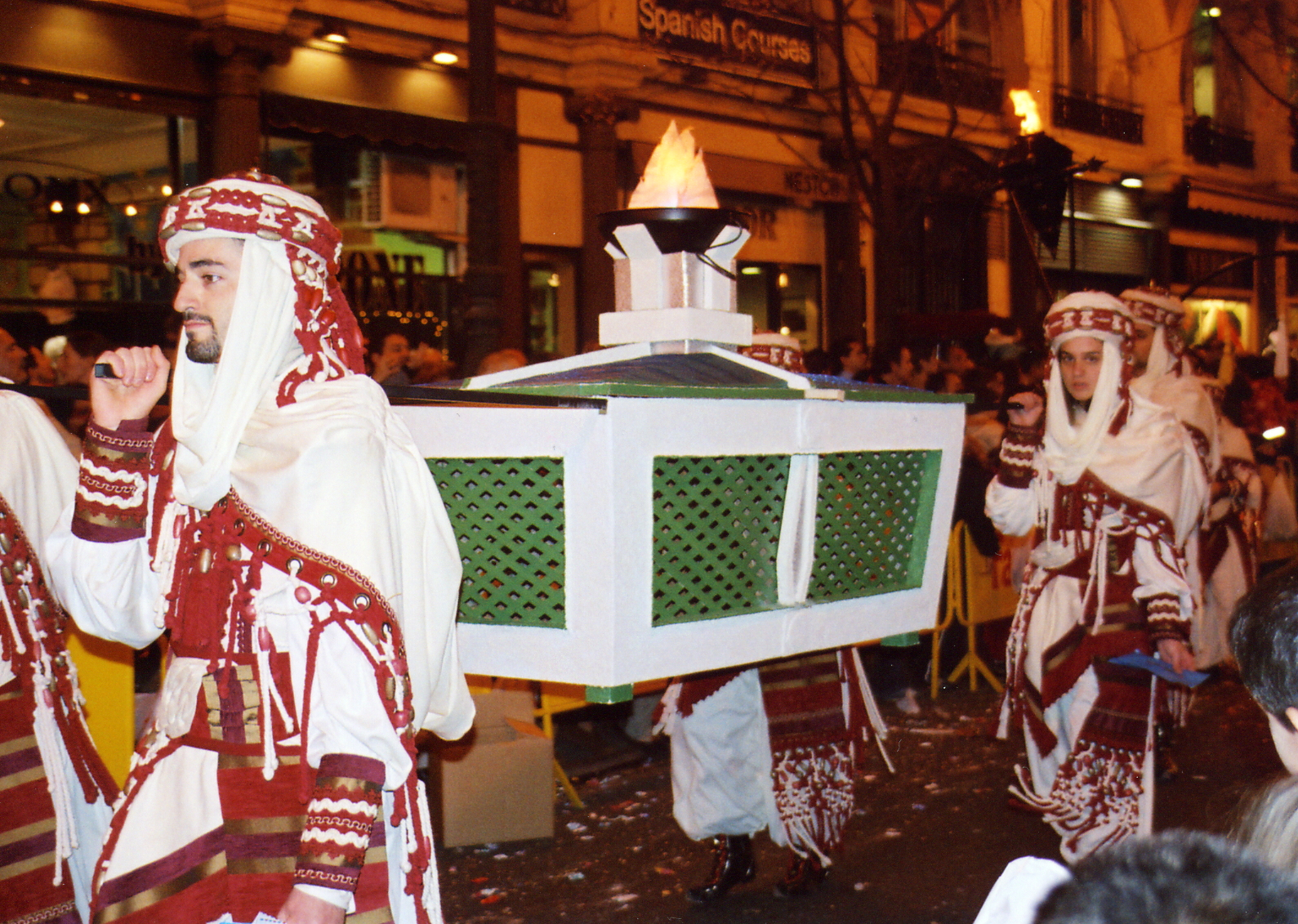 Cavalcada dels Reis, Valencia-España